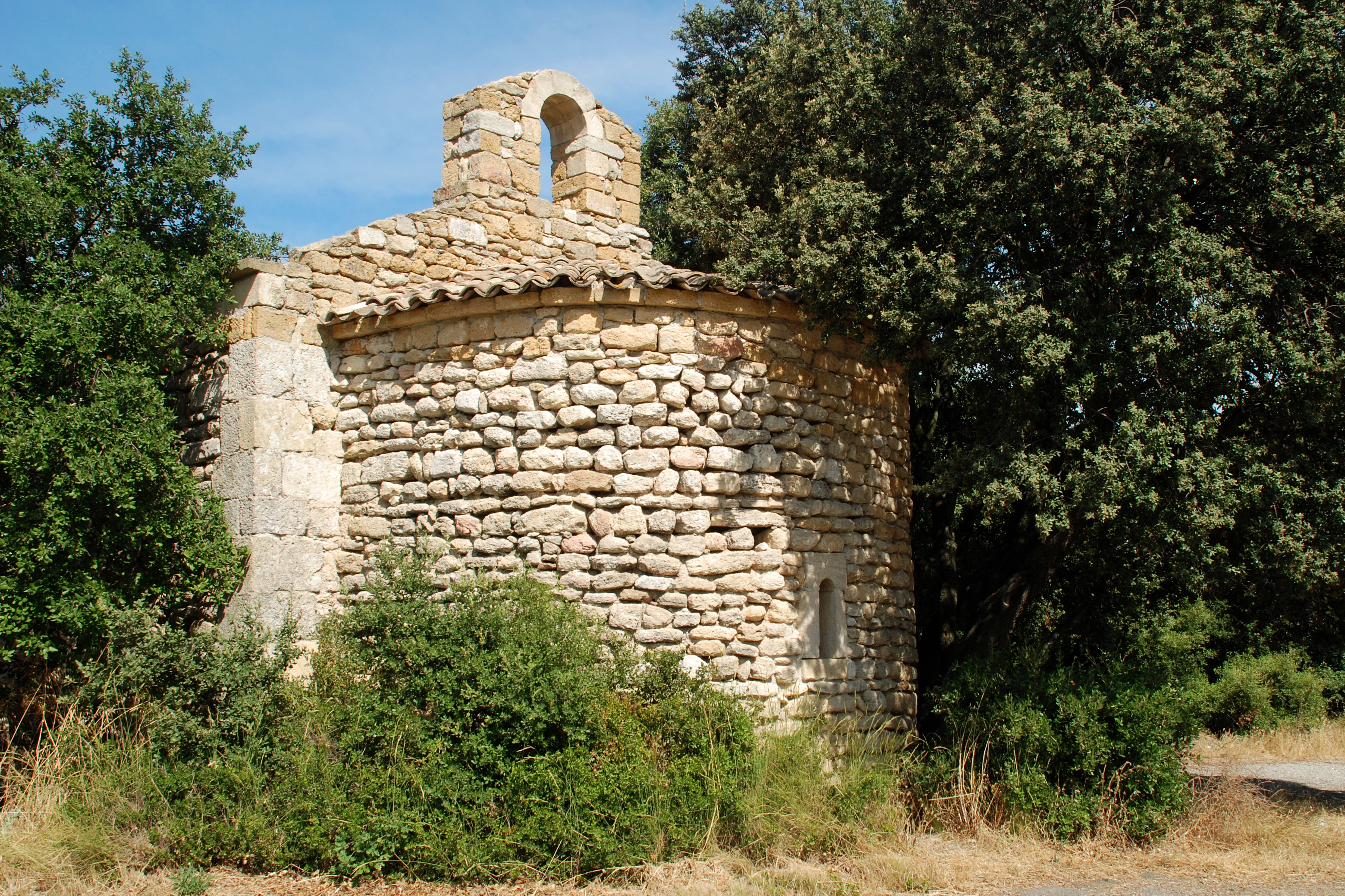 France - Provence - Bouches-du-Rhône - Chapelle Saint-Jean d'Alleins